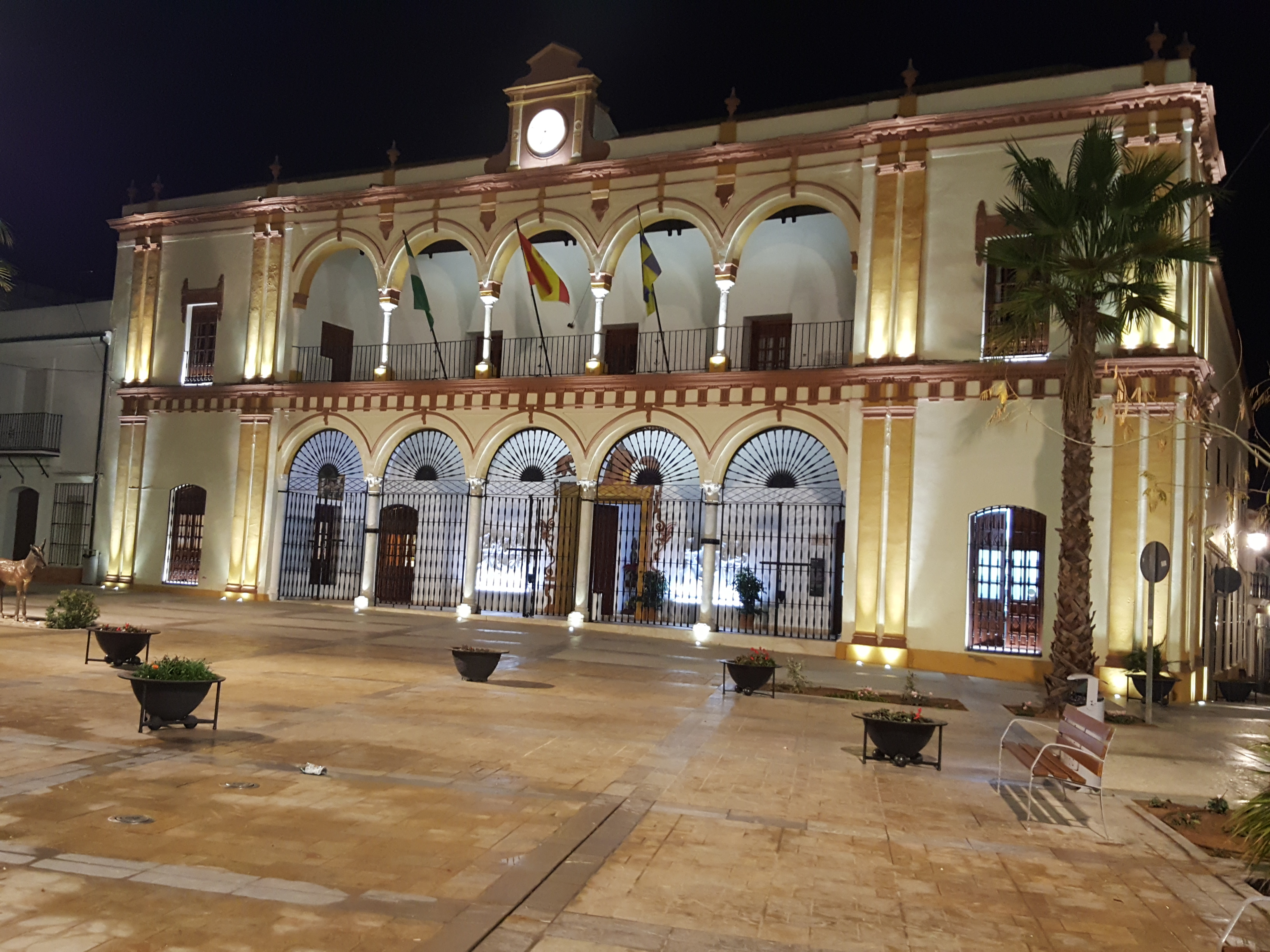 Casa Consistorial de Moguer, Andalucía (España).